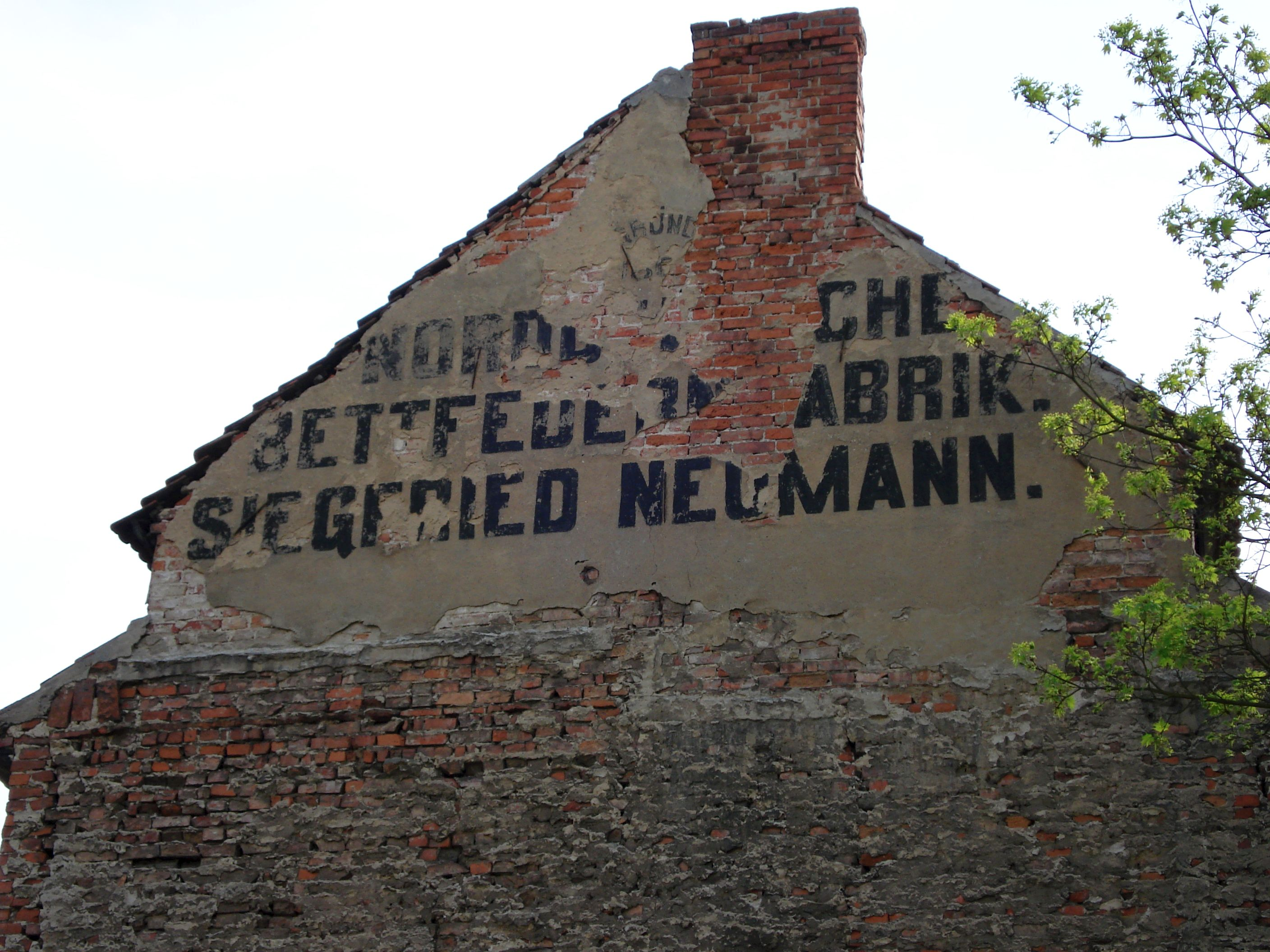 historischer Schriftzug Norddeutsche Bettfedernfabrik Siegfried Neumann in Frankfurt (Oder)